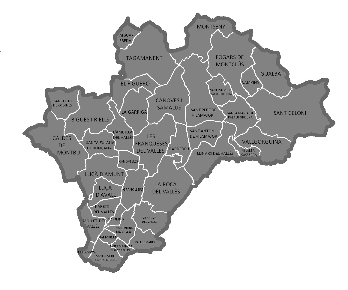 Hola què tal.